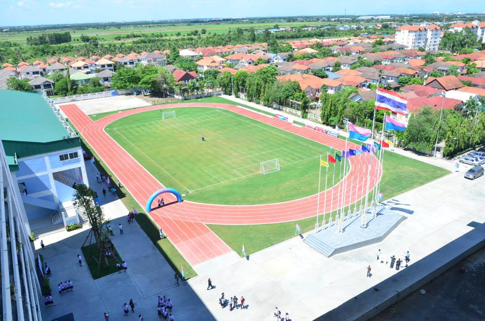 สนามฟุตบอล+ลู่วิ่ง สกร